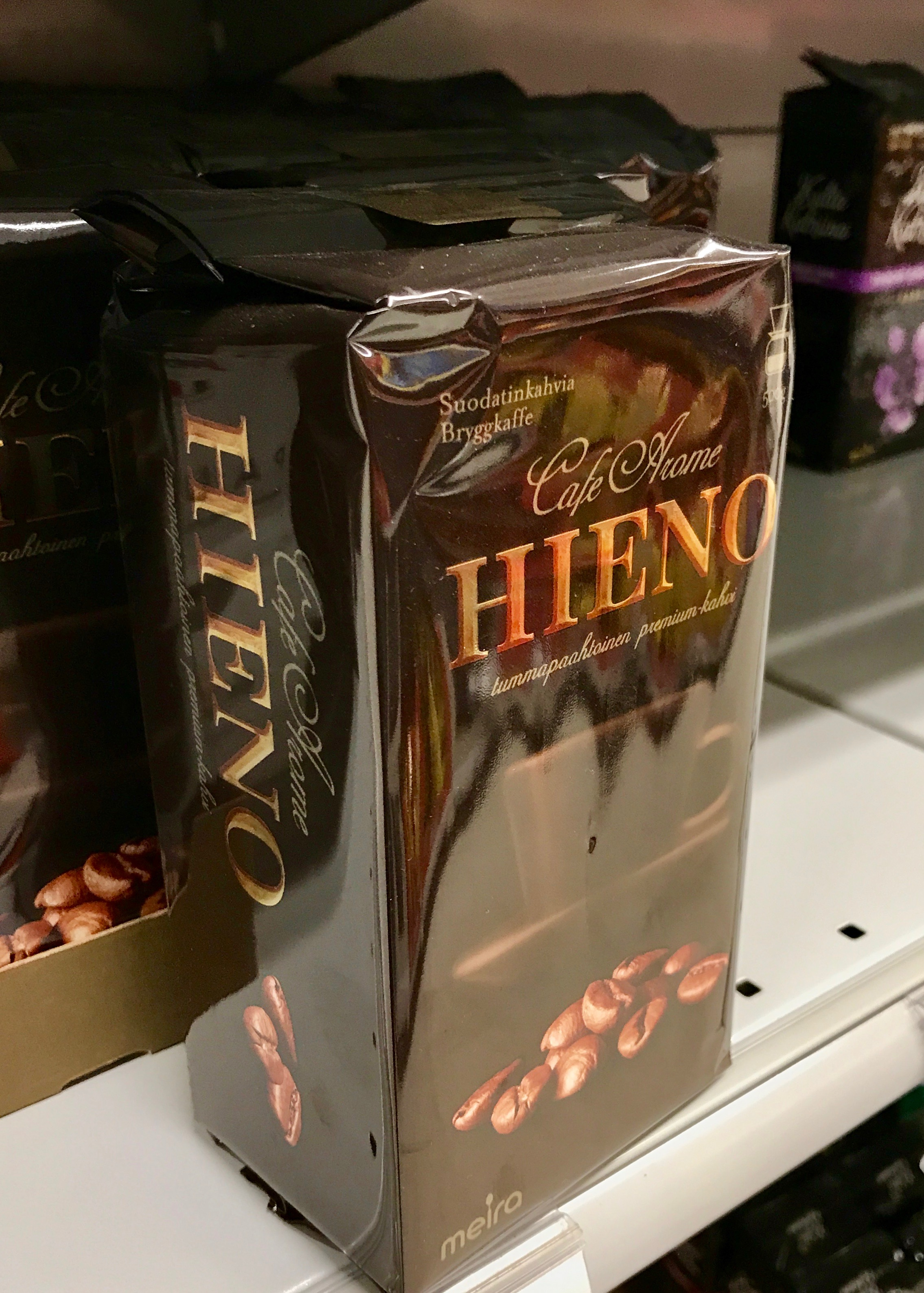 Cafe Arome Hieno on Meiran kahvimerkki.